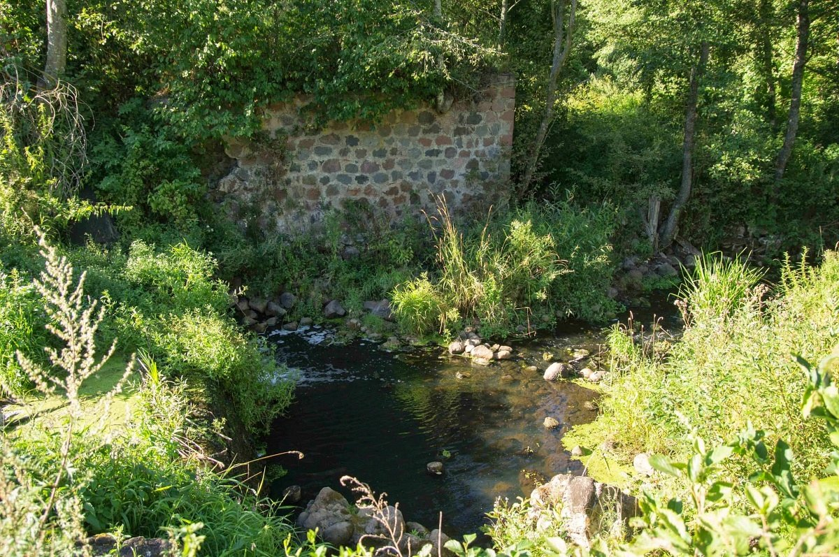 Юзафова. Вадзяны млын